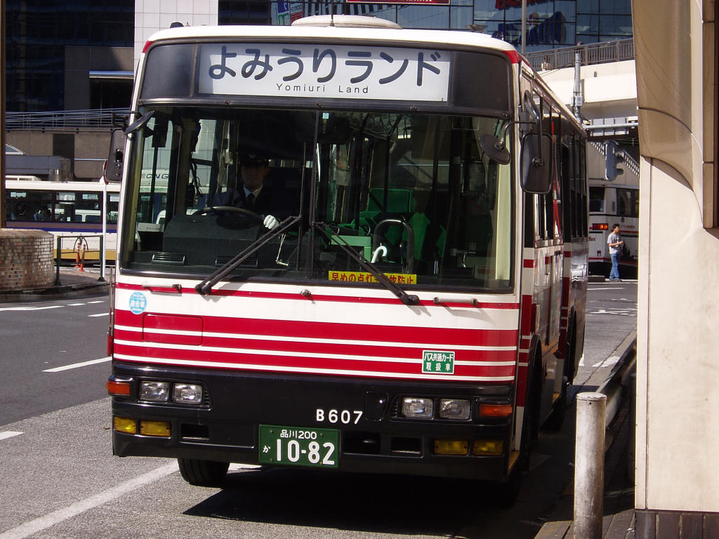 Odakyu City Bus B607 Mitsubishi KC-MK619J at Shinjuku Sta.